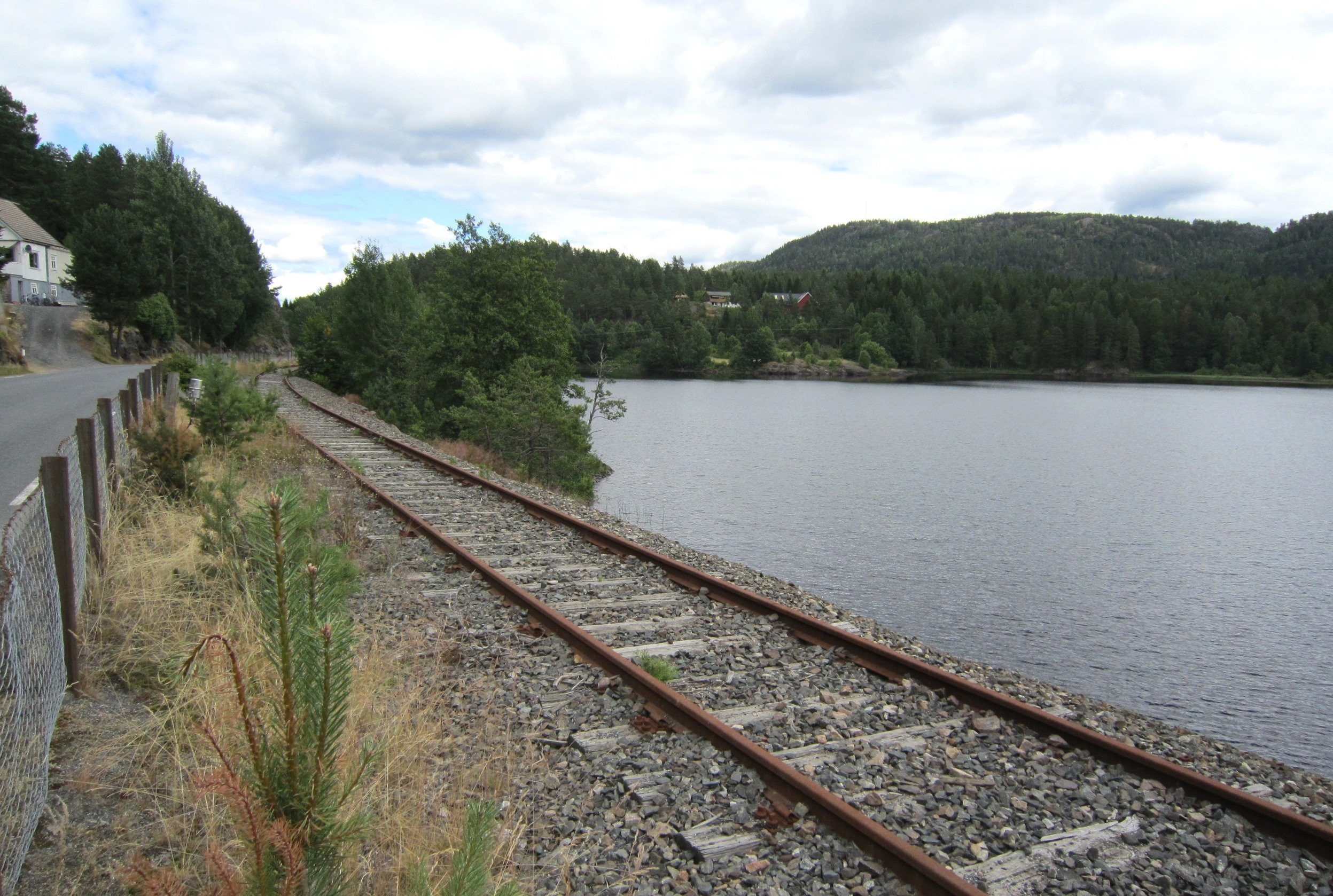 Fylkesvei 256 går parallelt med Kragerølinjen på nordsiden av Neslandsvatn.